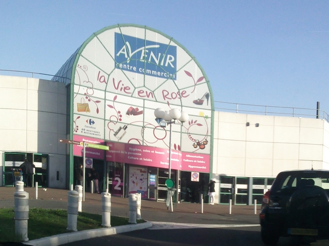 Drancy - centre commercial Avenir